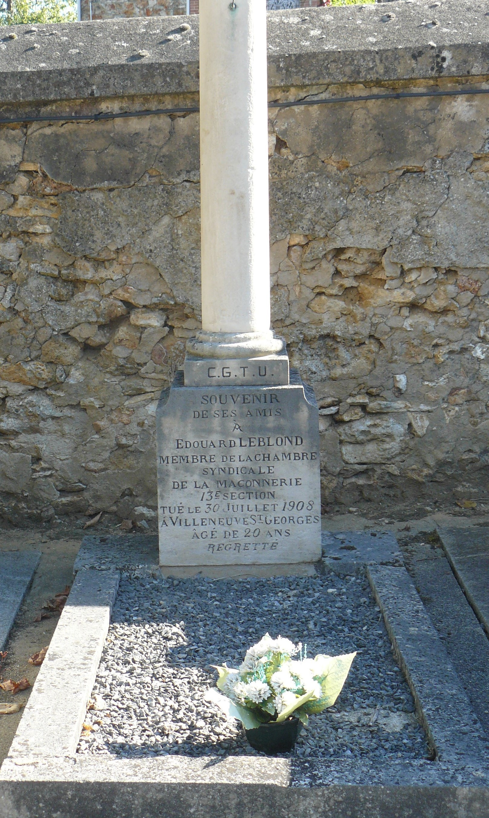 Tombe au cimetière de Palaiseau (Essonne) de l'ouvrier Édouard Leblond, tué à Villeneuve Saint-Georges le 30 juillet 1908